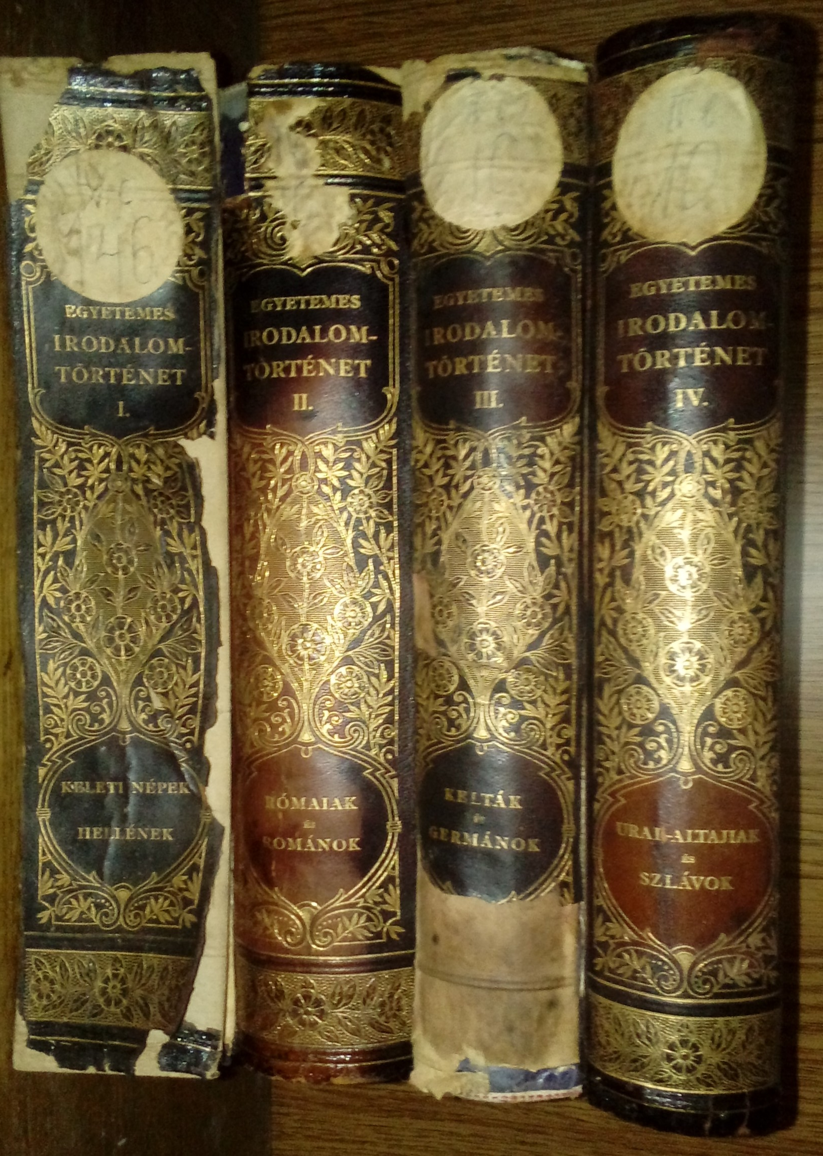 Heinrich Gusztáv (szerk.) Egyetemes irodalomtörténet